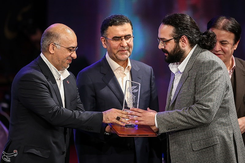 دریافت سیمرغ بلورین بهترین کمپین تبلیغاتی سینمای ایران / سال ۱۳۹۳